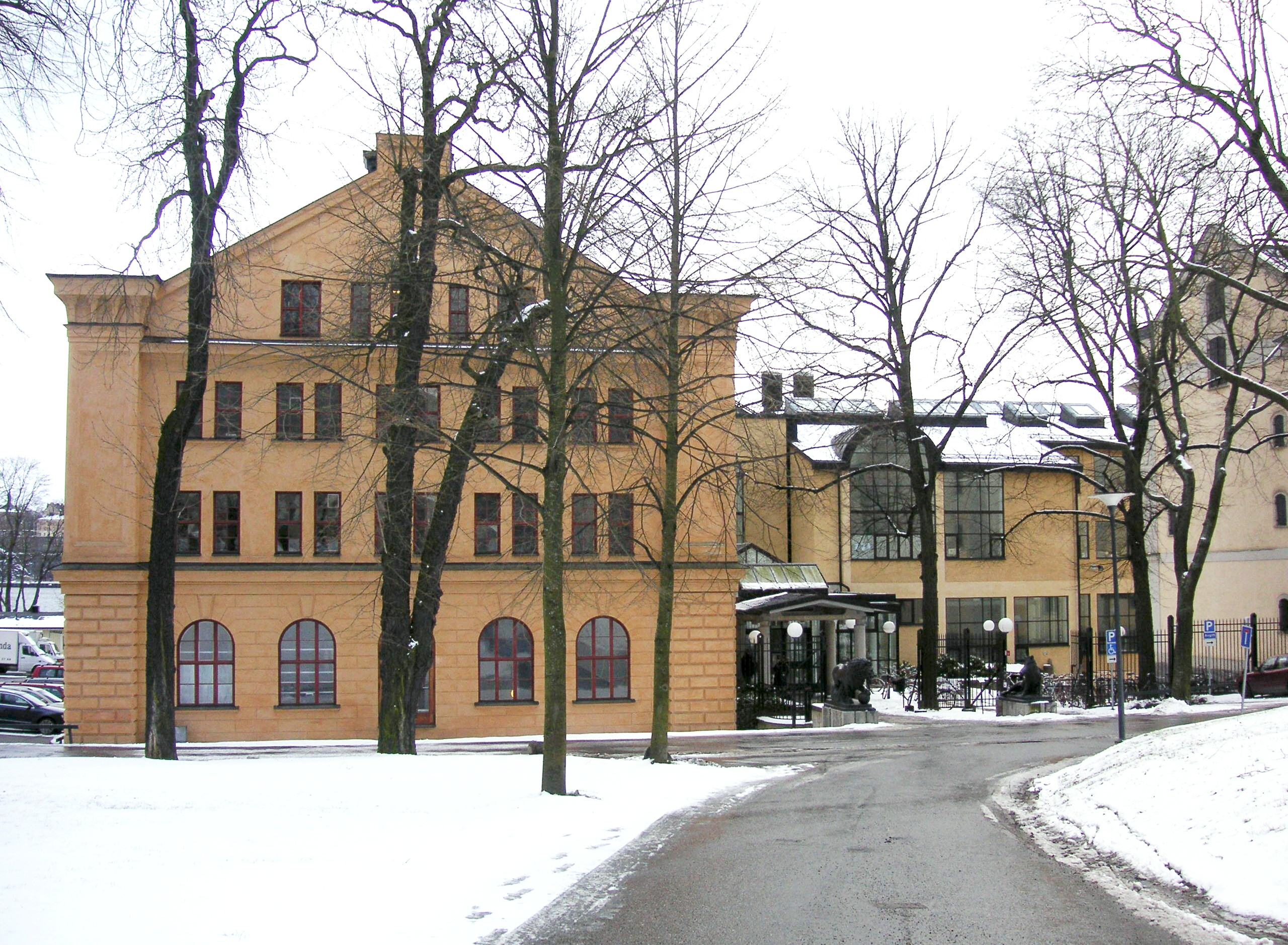 Kungliga konsthögskolen på Skeppsholmen i Stockholm